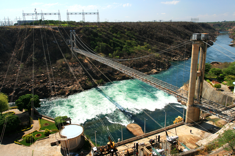 O Complexo Hidrelétrico de Paulo Afonso é um conjunto de usinas, localizado na cidade de Paulo Afonso, que produz 4.000 megawatts de energia, gerada a partir so desnível natural de 80 metros da cachoeira de Paulo Afonso, no rio São Francisco.